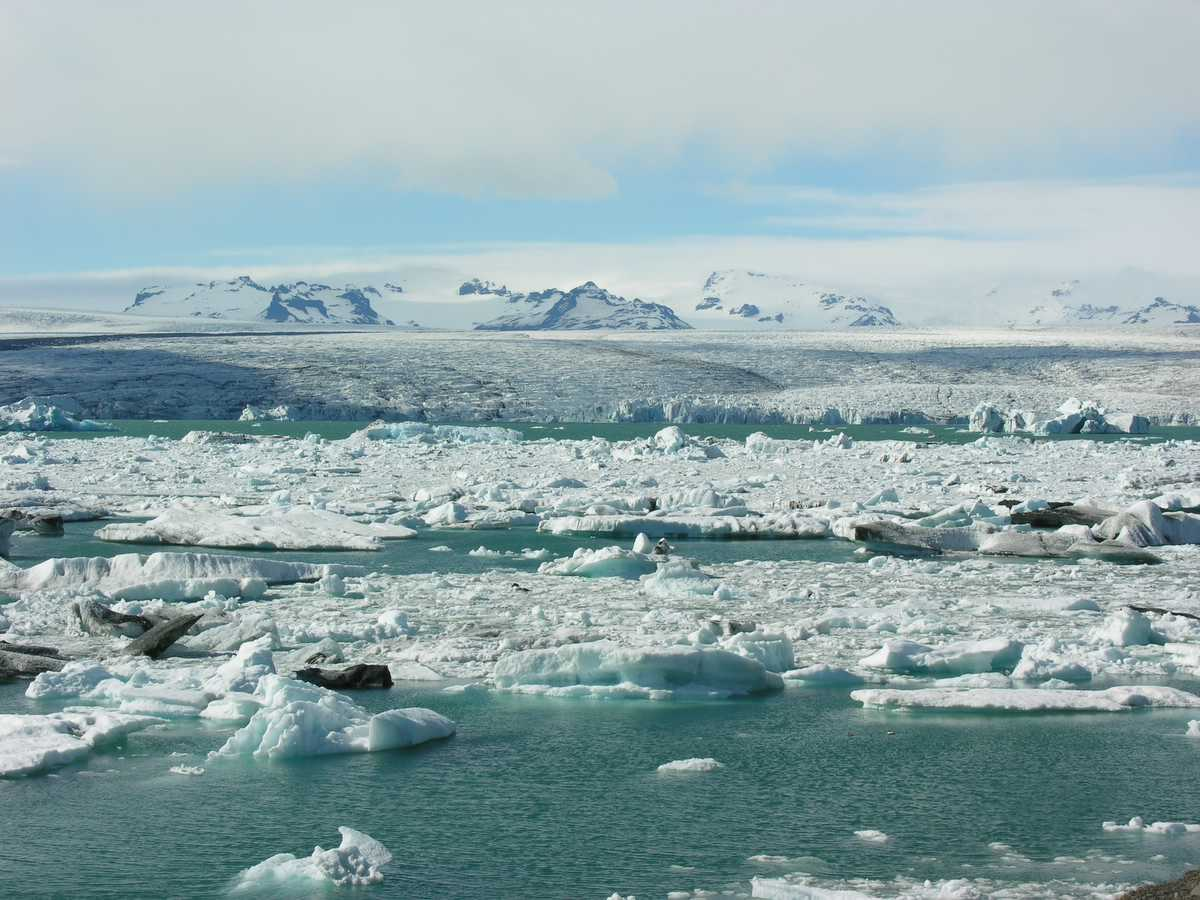 Jökulsárlón, Iceland